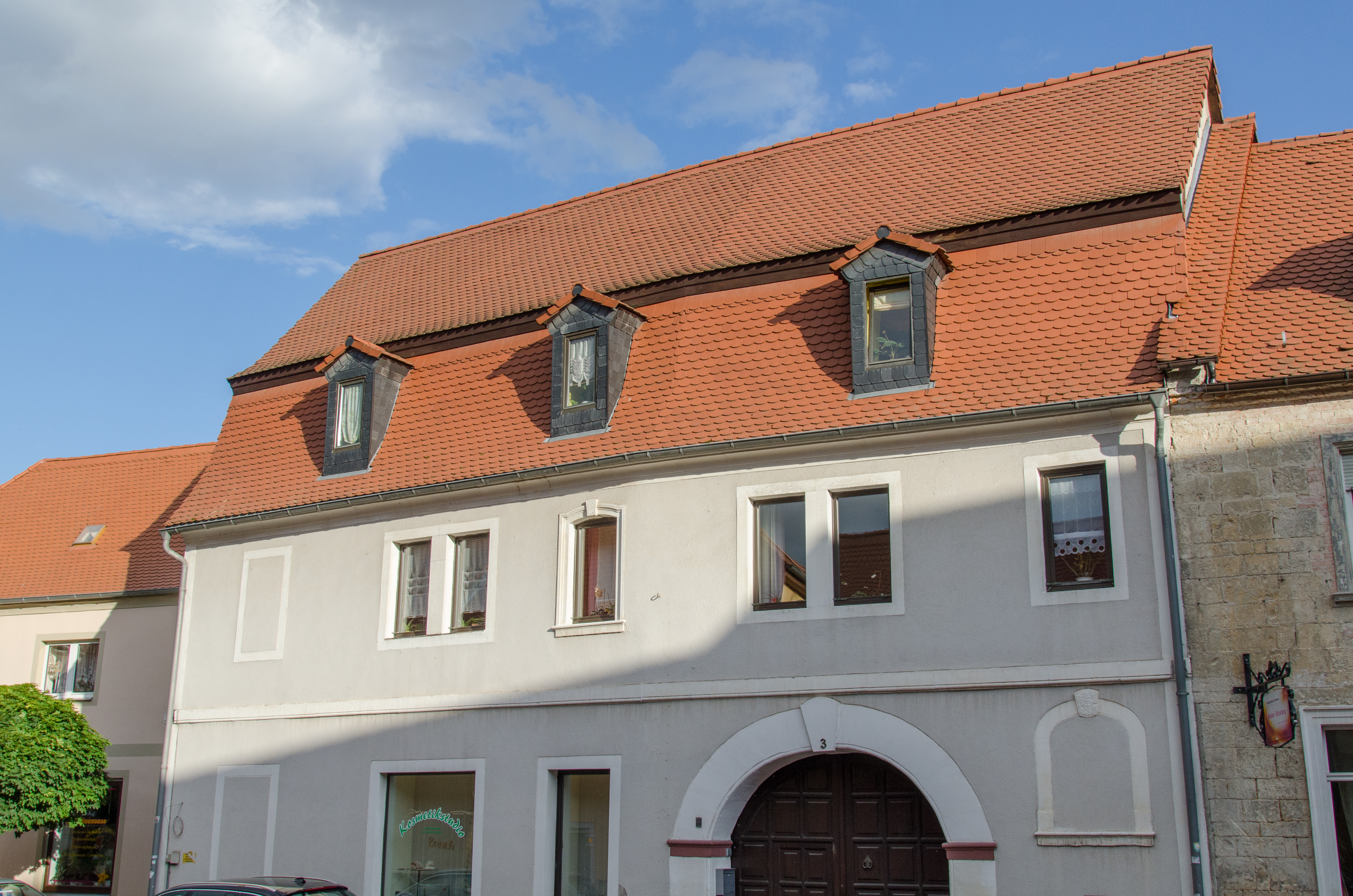 Querfurt, Lederberg 3